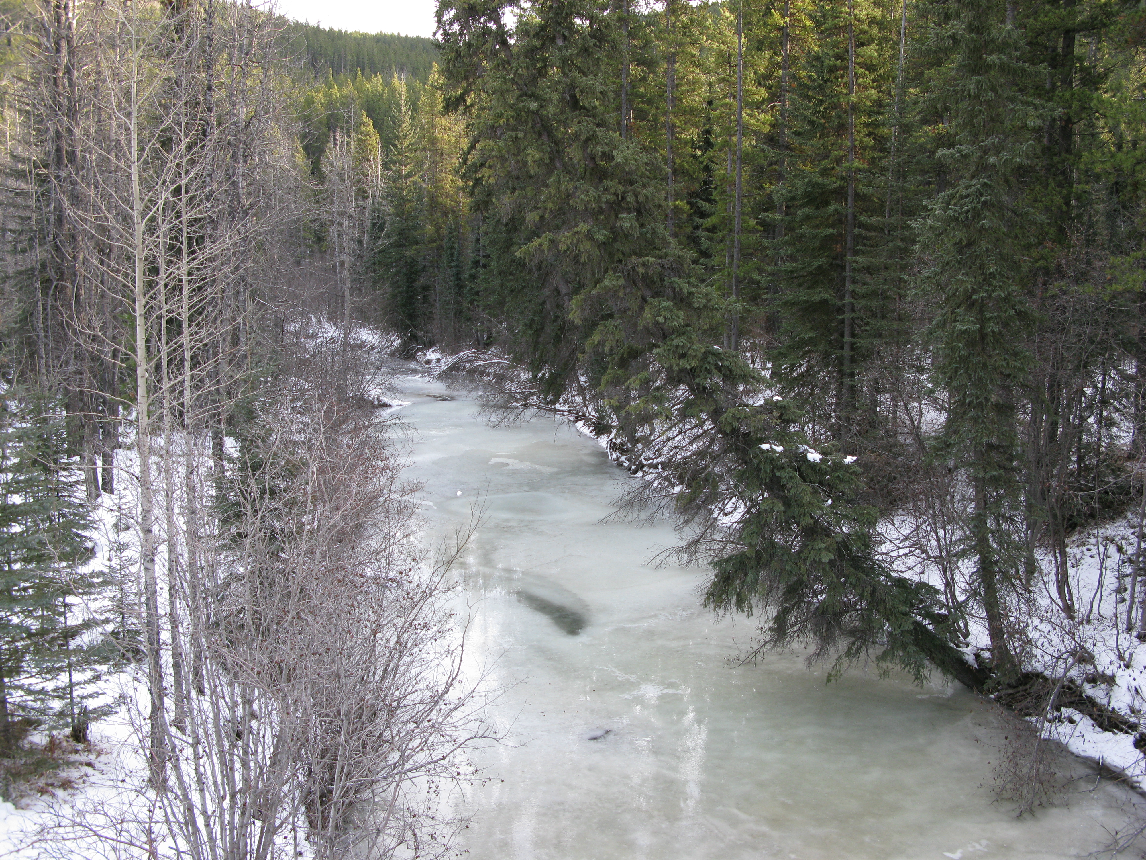 EmbarrasRiver2